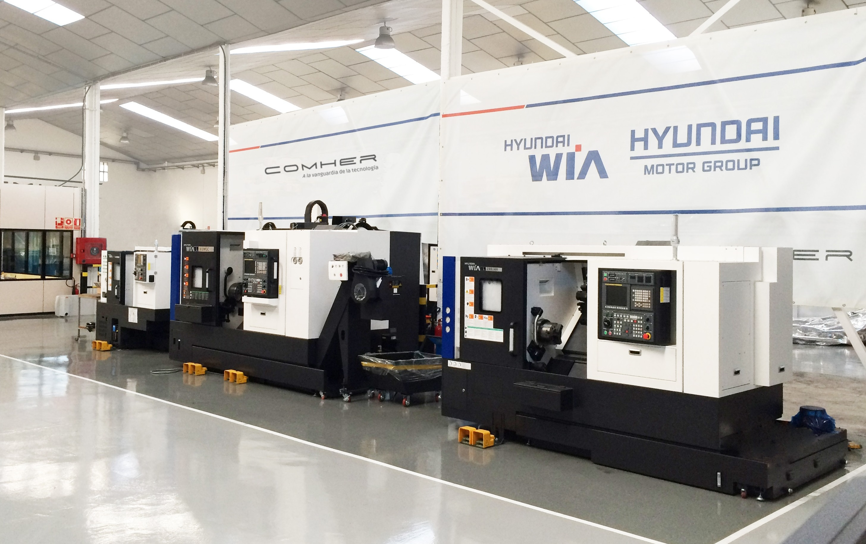 Distribuidor de Máquina Herramienta e Impresoras 3D profesionales en España